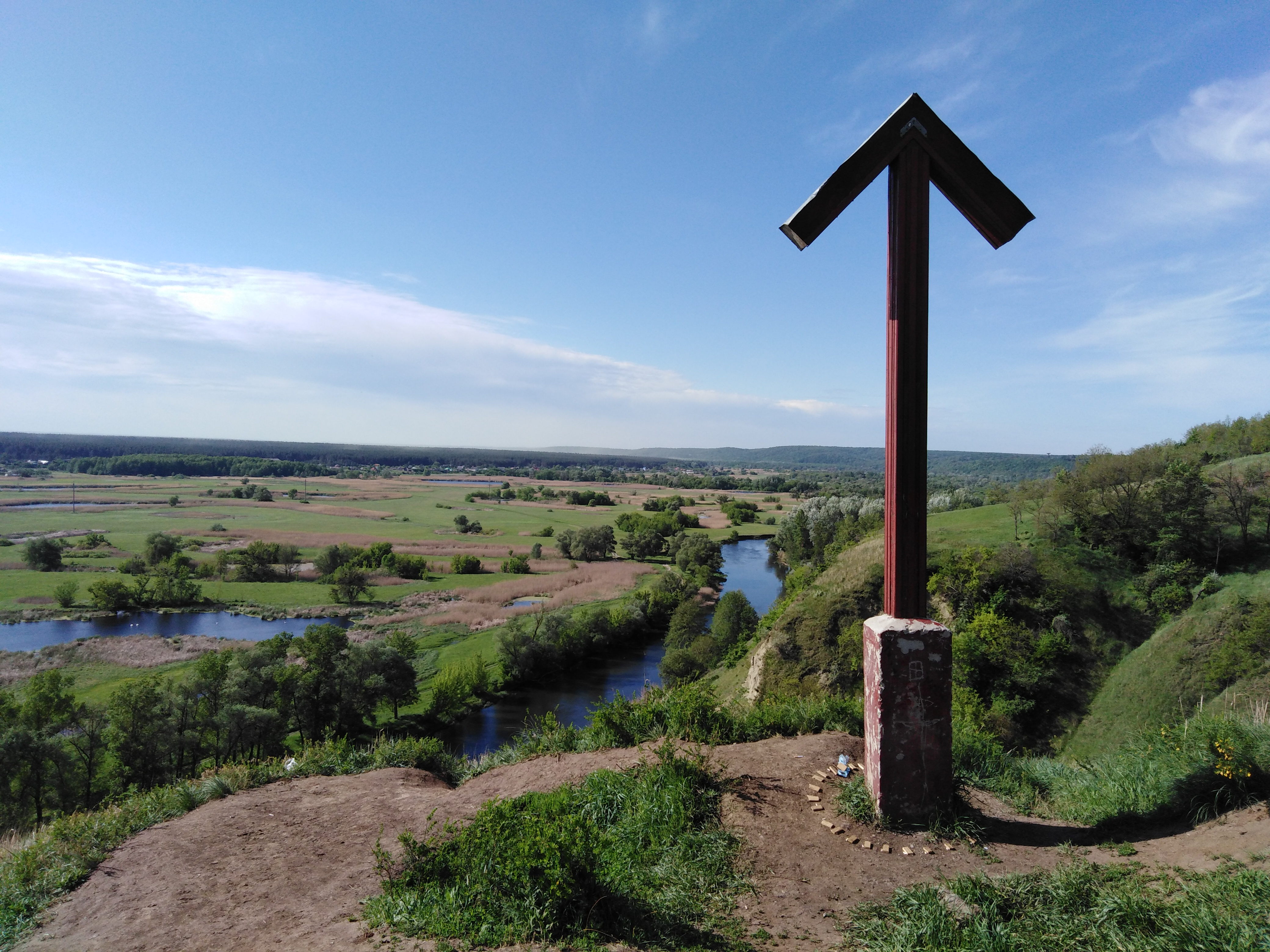 Україна. Харківська область. Місто Зміїв. Змієві кручі. Високий берег річки Сіверський Донець.